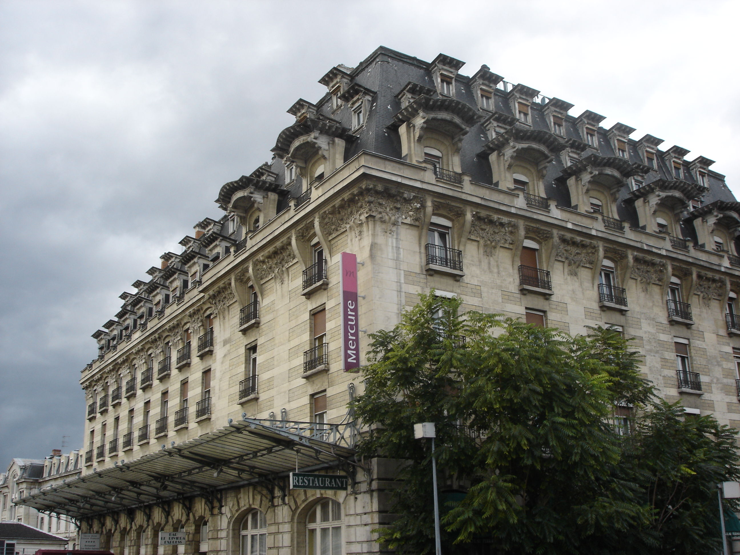 Vue du sud-est de la façade de l'hôtel Terminus, situé près de la gare de Perrache, à Lyon, en France.